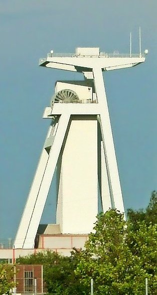 Fördergerüst Schacht IV der Grube Göttelborn im Saarland, Höhe 90 m.